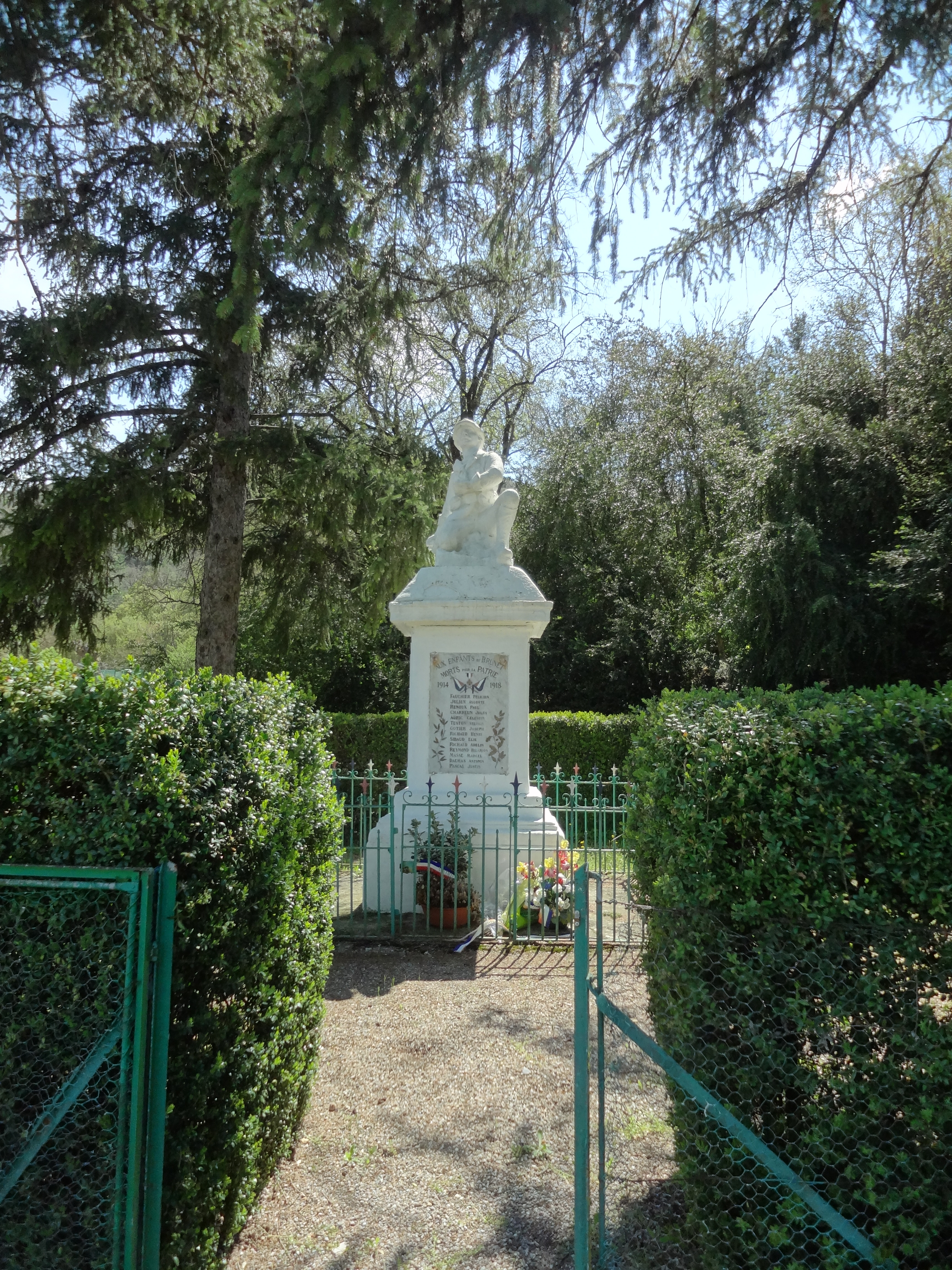 Monument aux morts de Brunet (Alpes-de-Haute-Provence).JPG